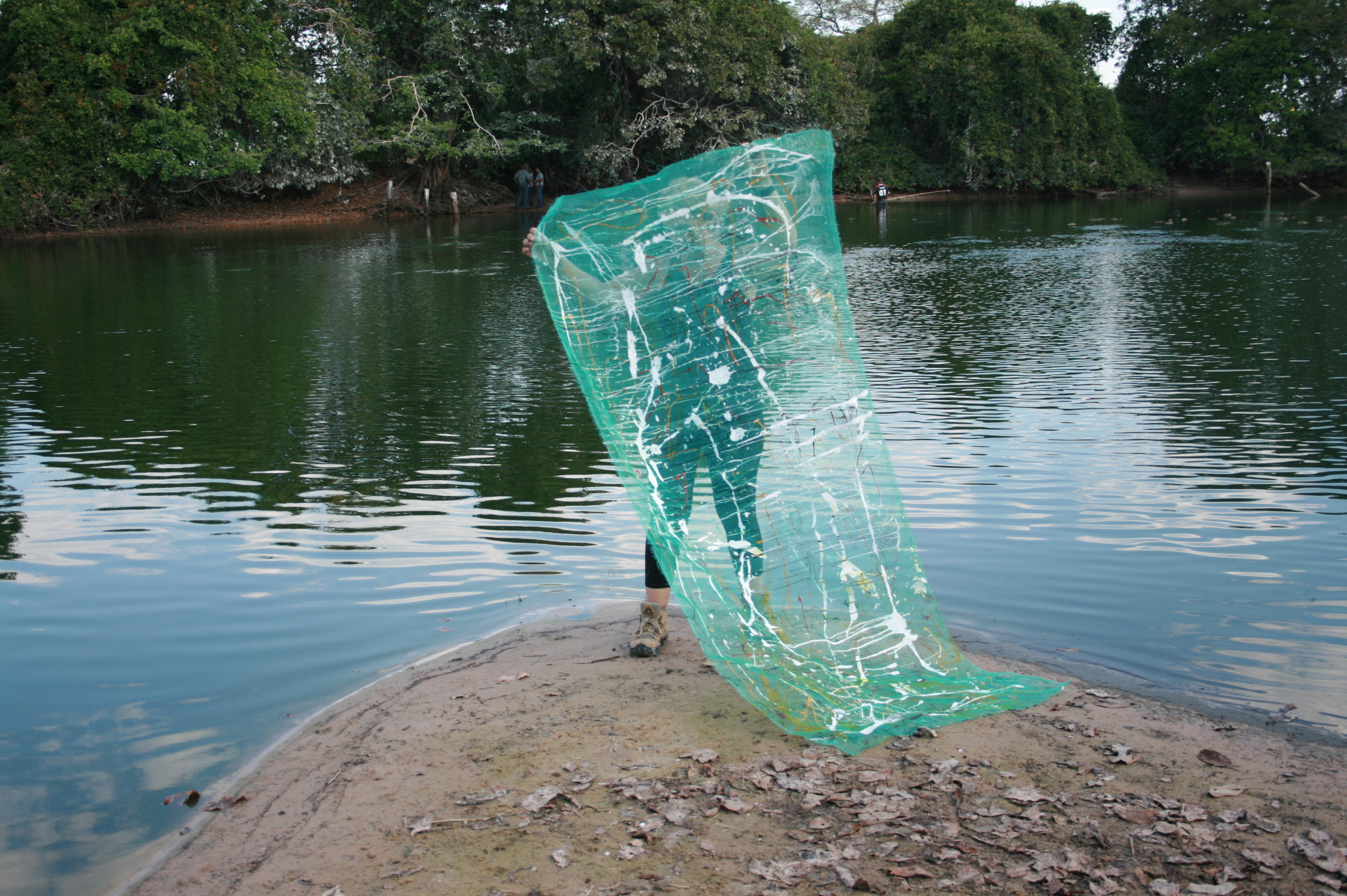 Obra da artista Maria Helena Manzan em uma de suas visitas na Amazônia